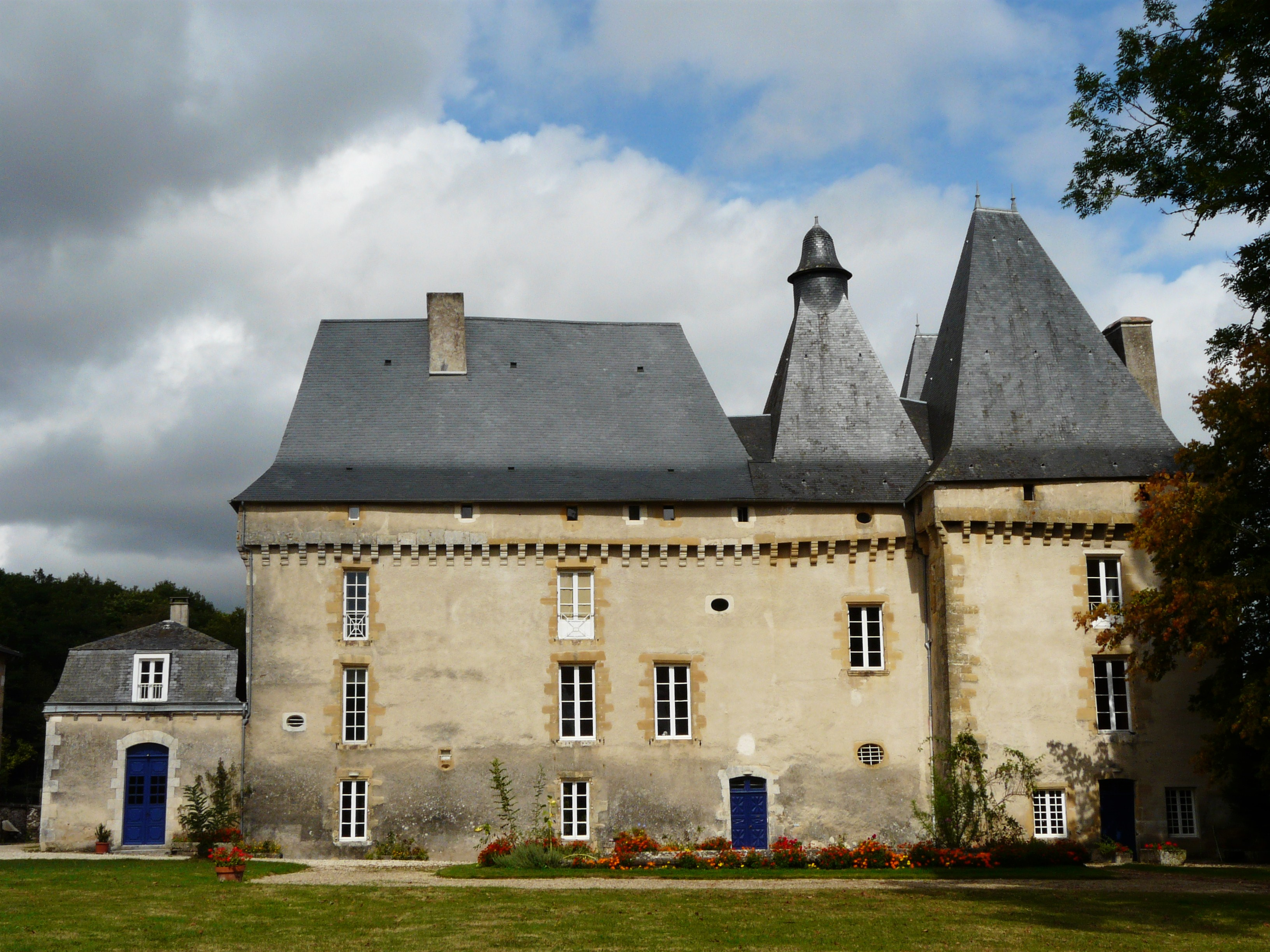 La façade sud du château de Mavaleix, Chalais, Dordogne, France